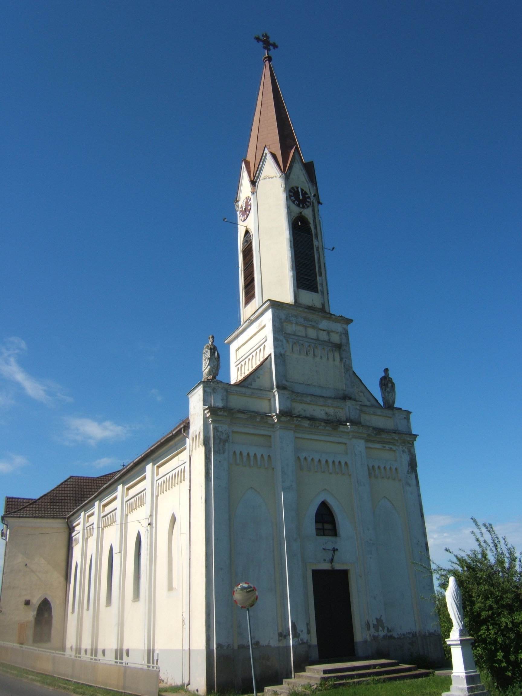 Lad római katolikus temploma.